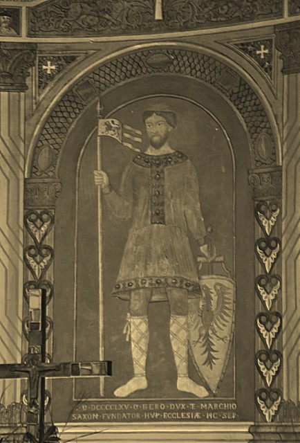 Gero - markrabě